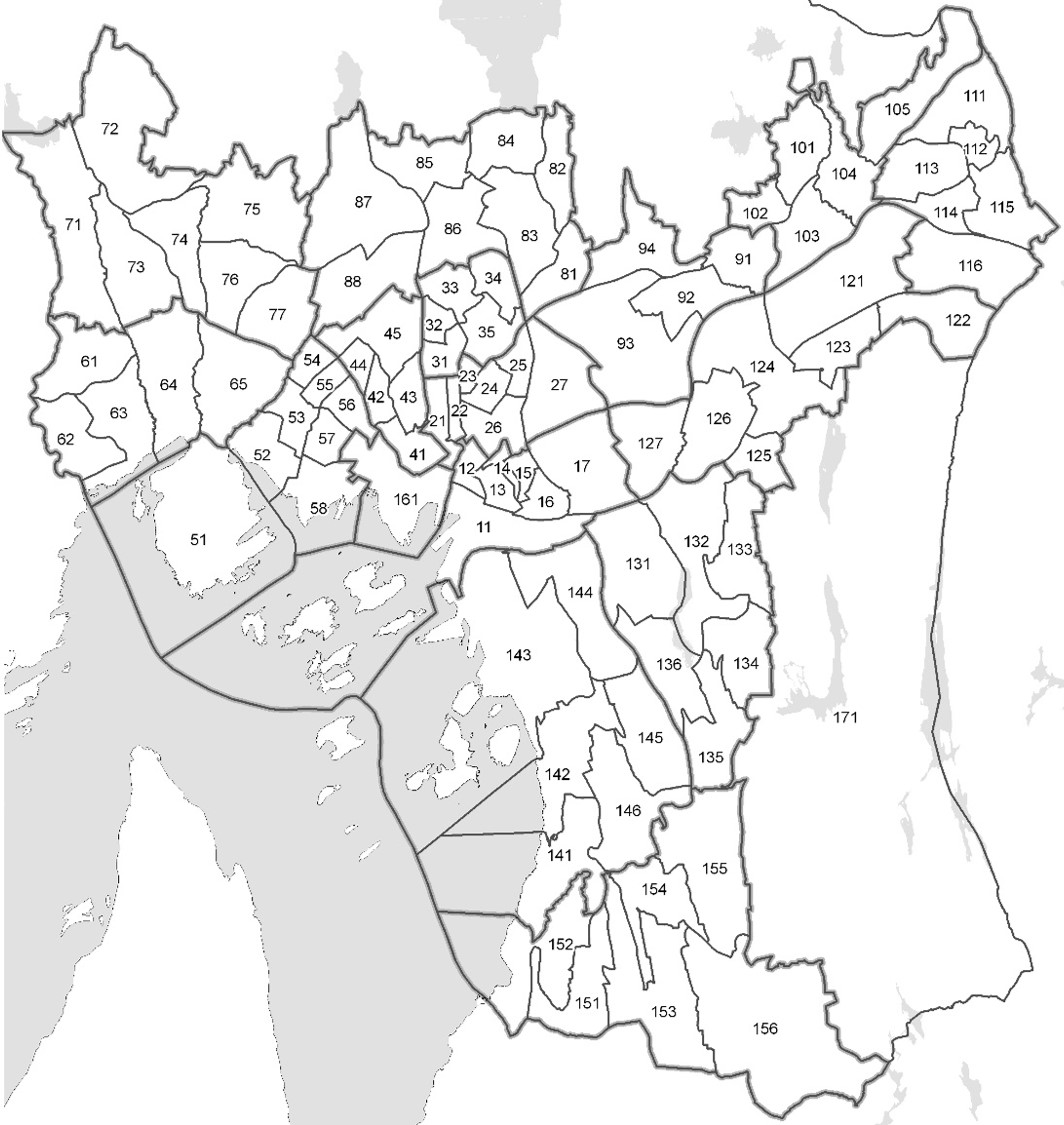 Kart over delbydeler i Oslo.